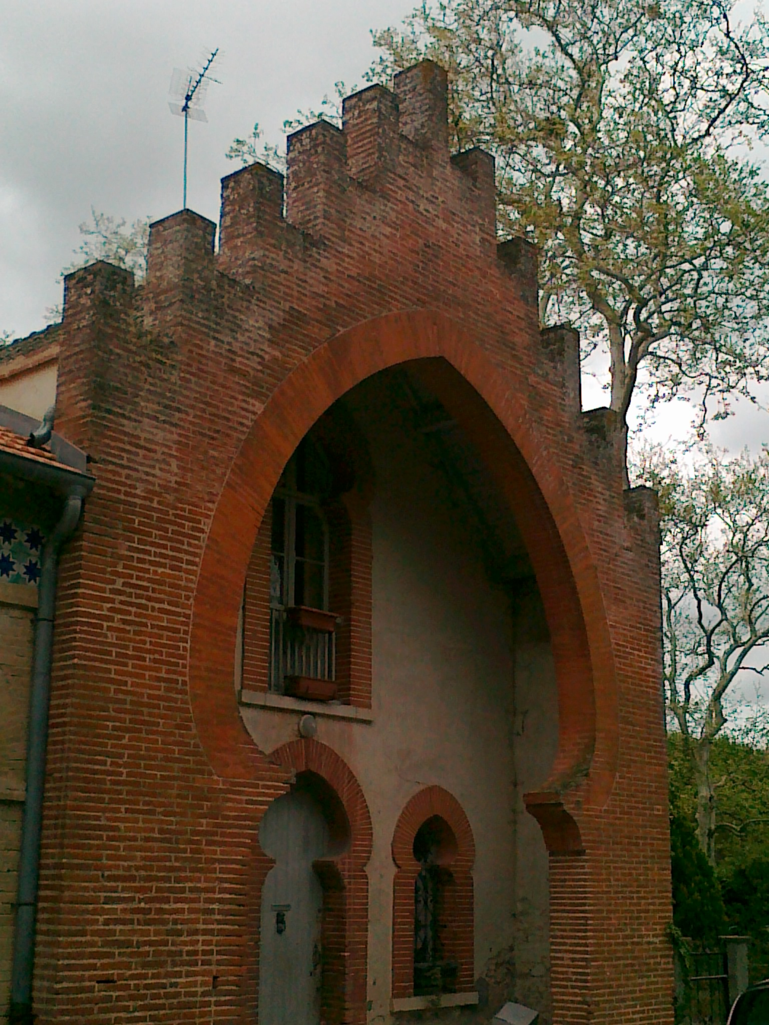 Maison du village de Saint-Rome (Haute-Garonne, France)